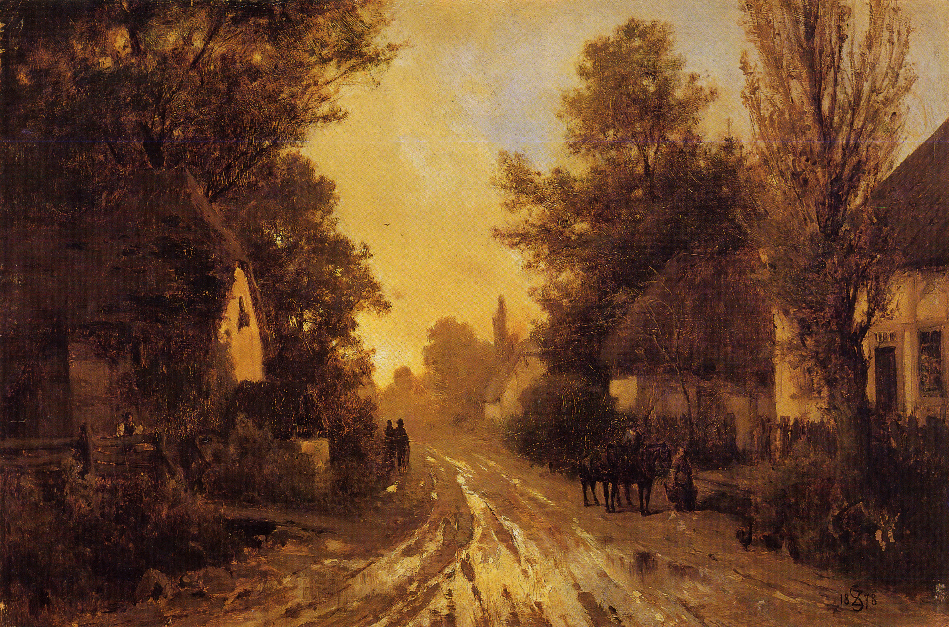 Wiejska droga jesienią